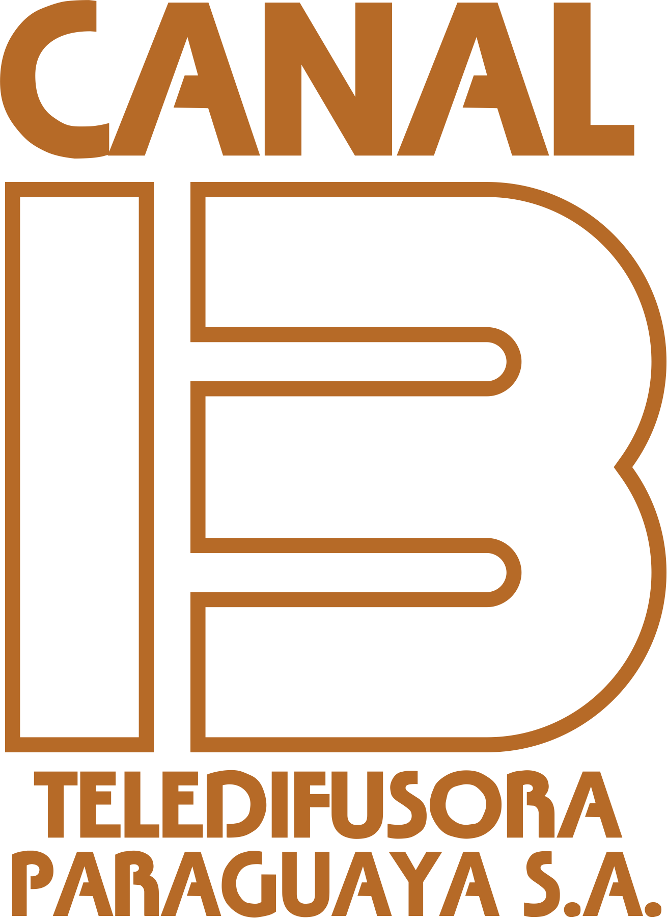 Primer Logo de Canal 13 (Paraguay)